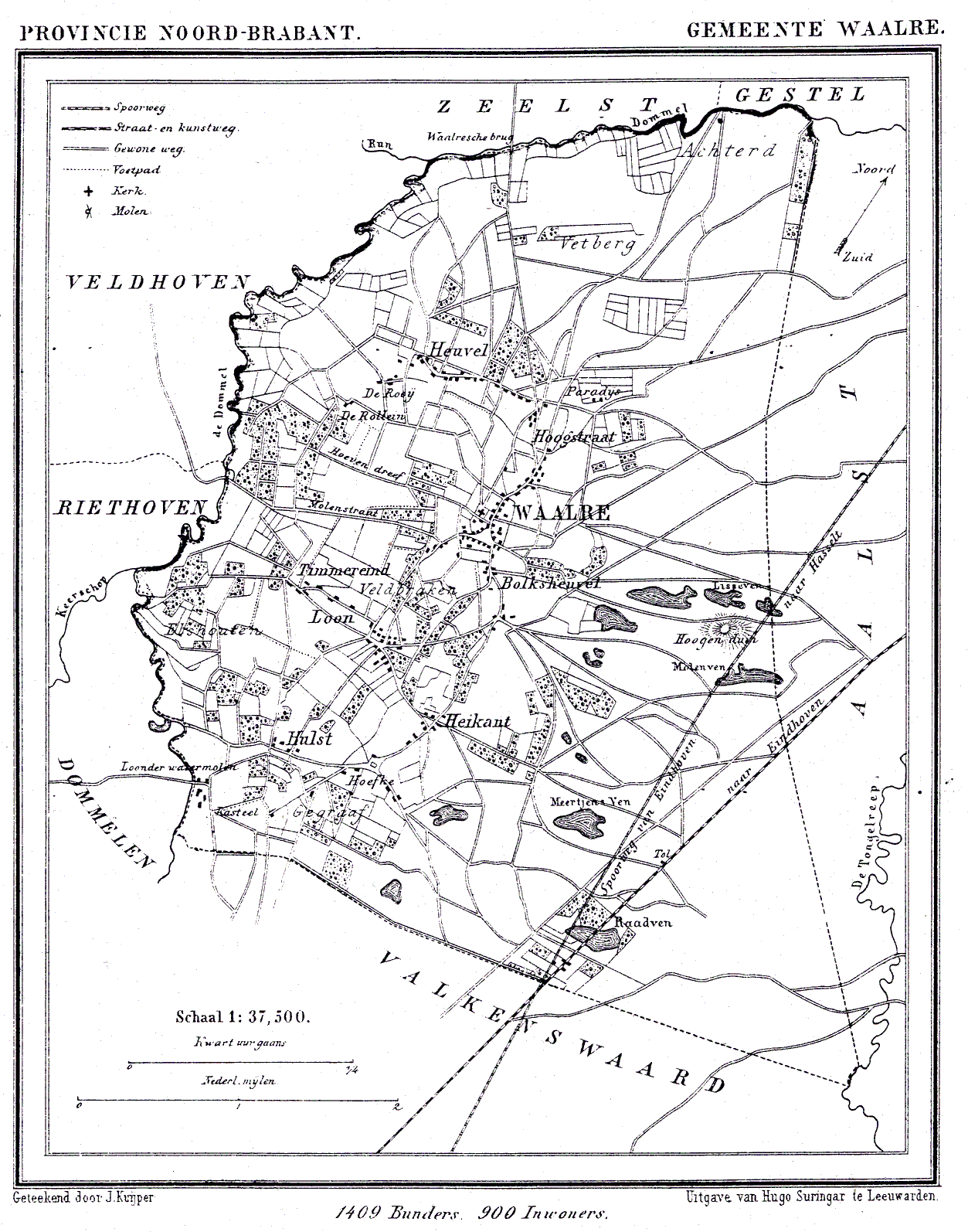 Nederland, Noord-Brabant, Gemeente Waalre